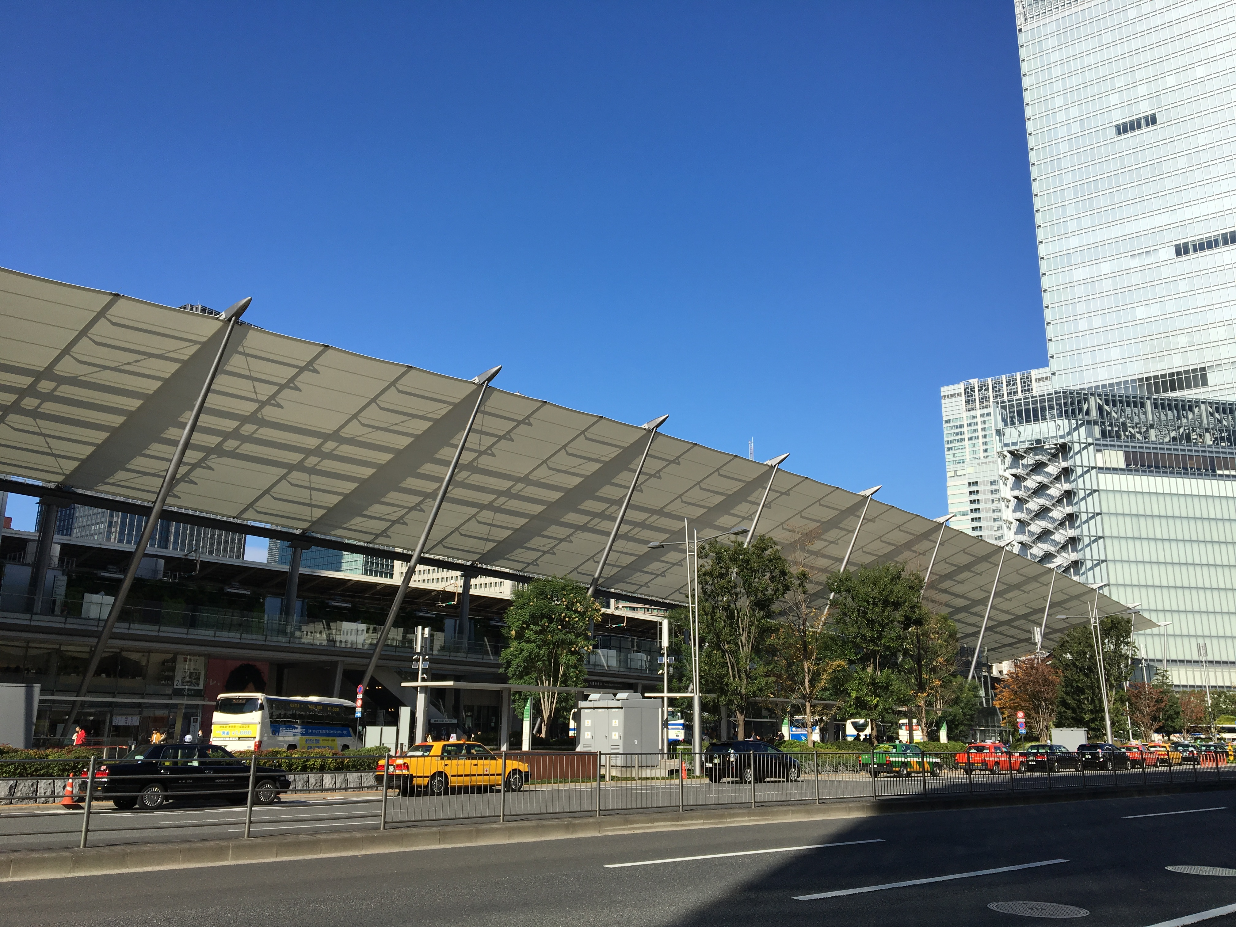 東京駅八重洲口